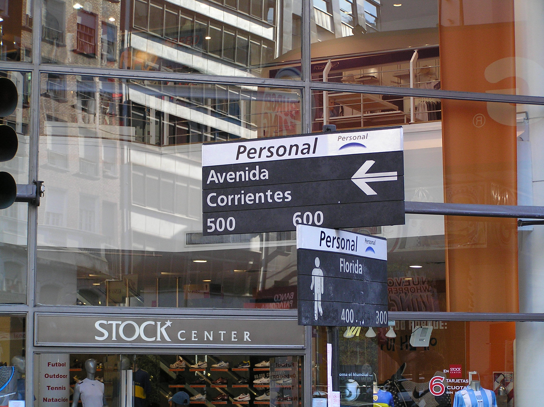 Indicador cruce Calles Corrientes y Florida (Buenos Aires).